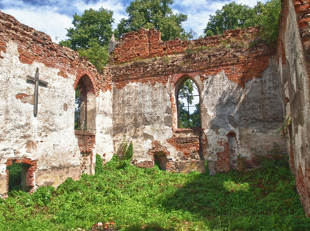 Ruiny kościoła parafialnego (pw. sw. Jakuba Starszego) z XV w w Osetniku na Warmii (zabytek nr. A-644)